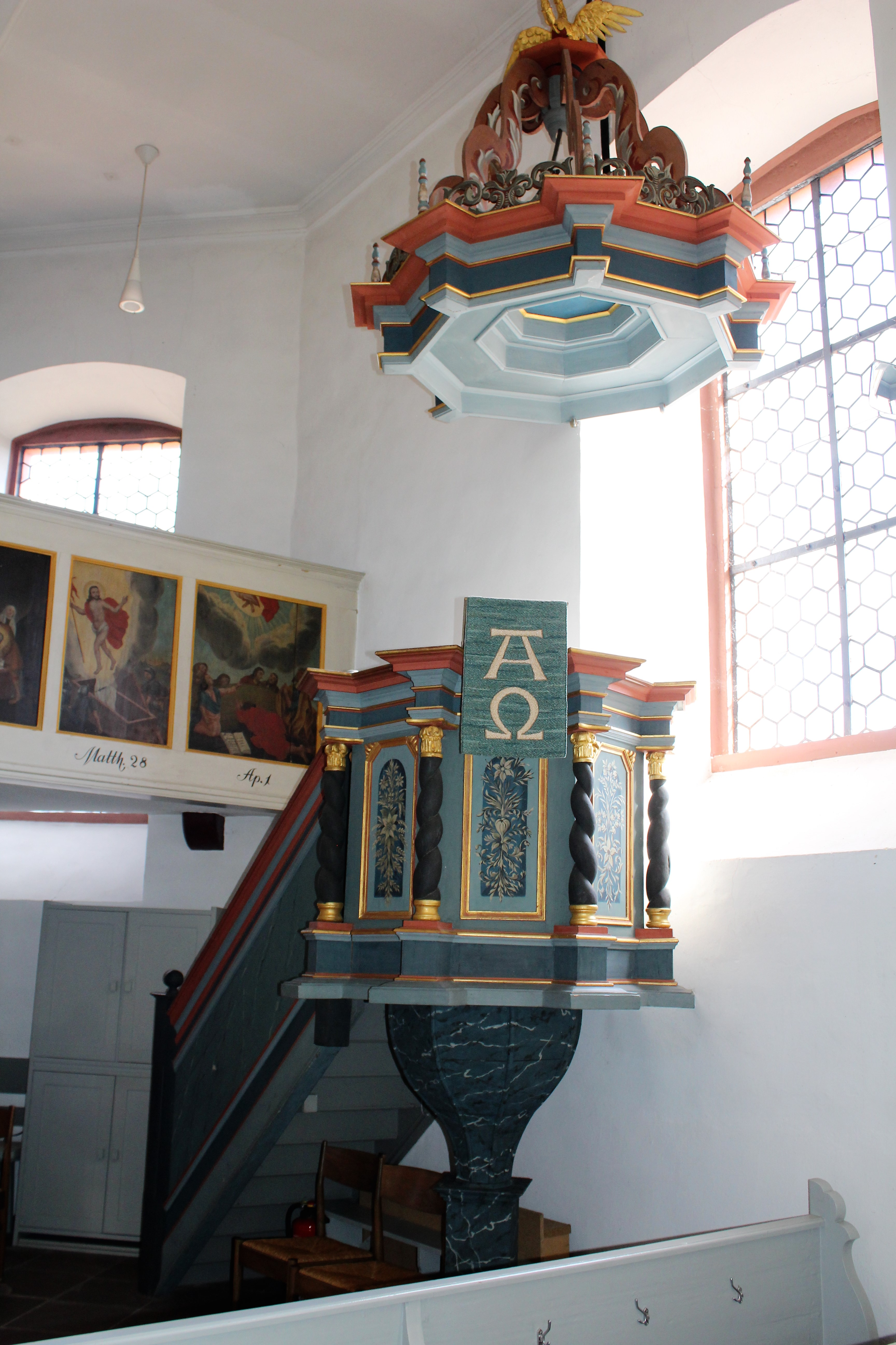 Evangelische Kirche Wallernhausen, Nidda, Wetteraukreis, Hessen, Deutschland